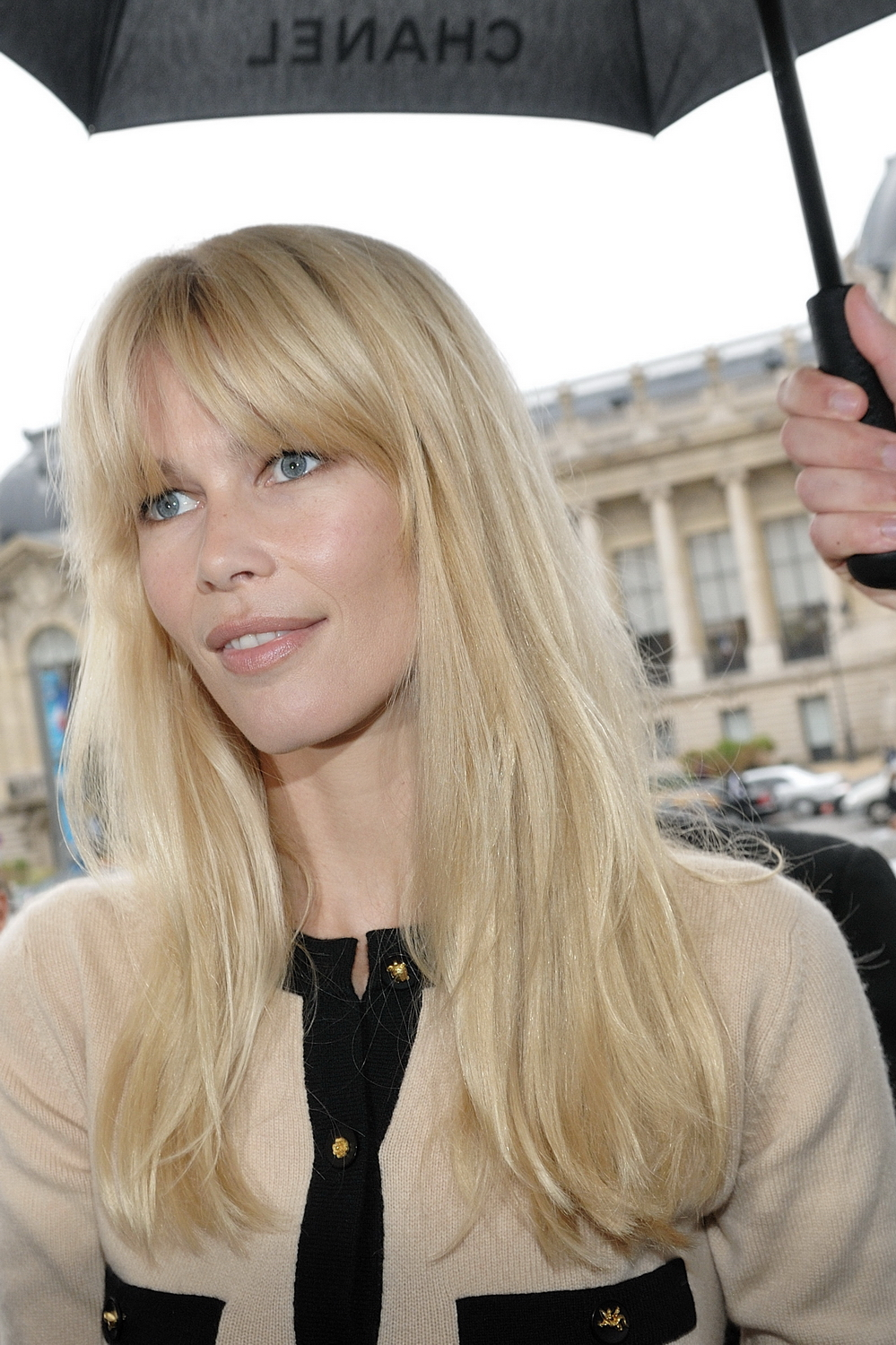 Défilé Chanel printemps/été 2010 prêt-à-porter au Grand Palais (Avenue du Général Eisenhower - Paris 75008)